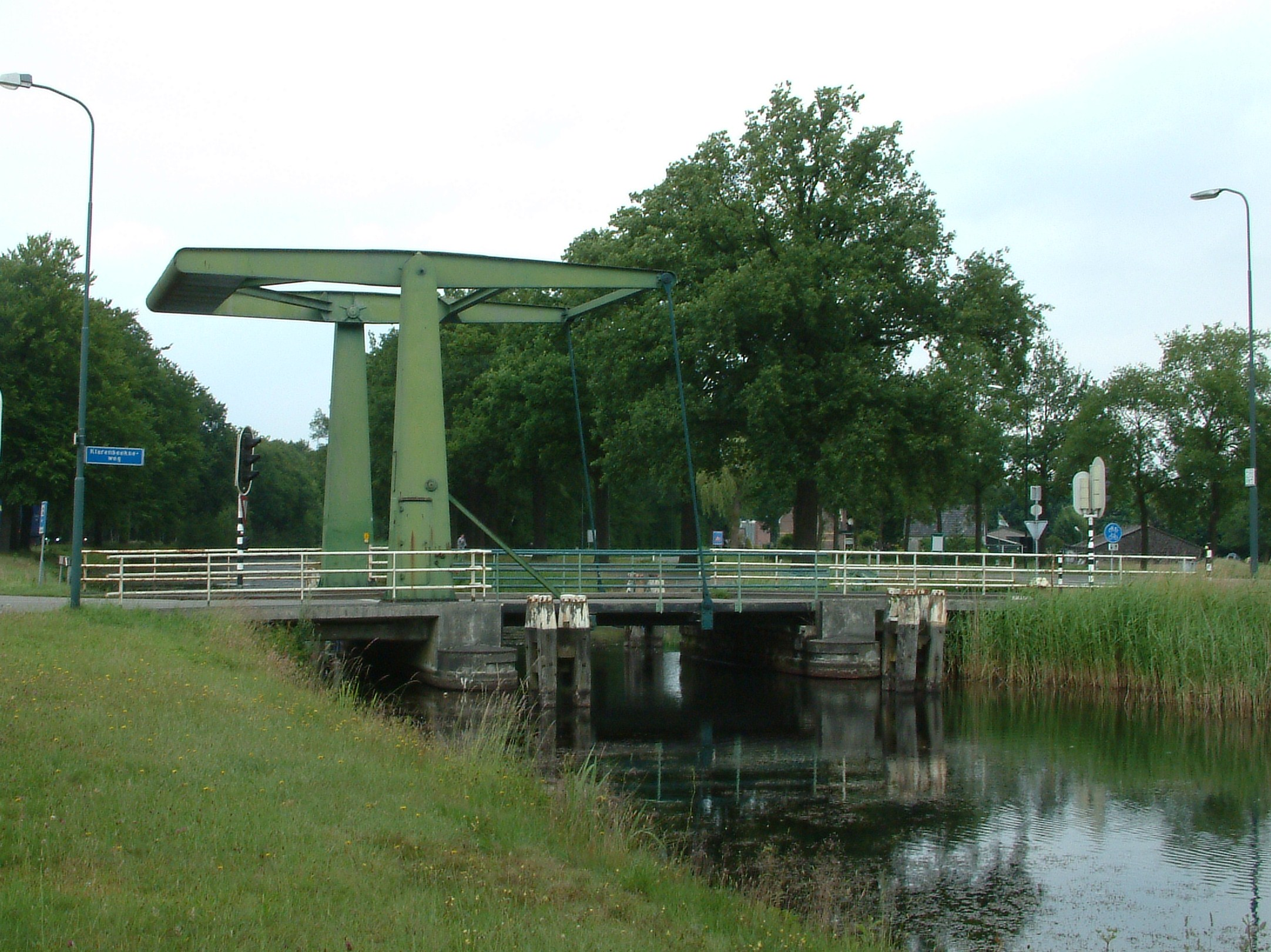 Apeldoorns kanaal van Dieren naar Hattem